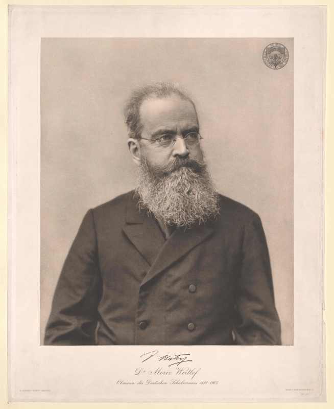 Moriz Weitlof (1835-1905), Rakouský právník a politik.